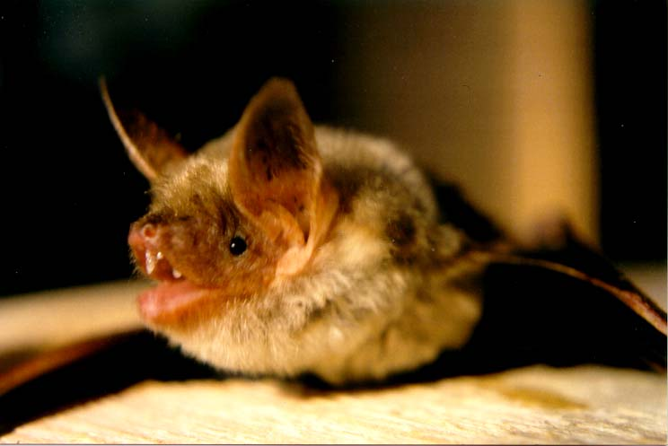 Description in de wikipedia Großes Mausohr (Myotis myotis), altes Individuum, kenntlich an den abgenutzten Zähnen, Foto: Manuel Werner, Nürtingen, AG Fledermausschutz Baden-Württemberg, GNU-Lizenz